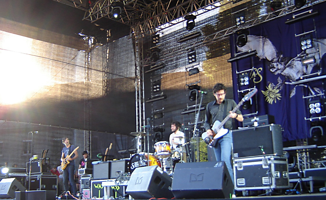 We Are Scientists at Zitatelle, in Mainz, Germany